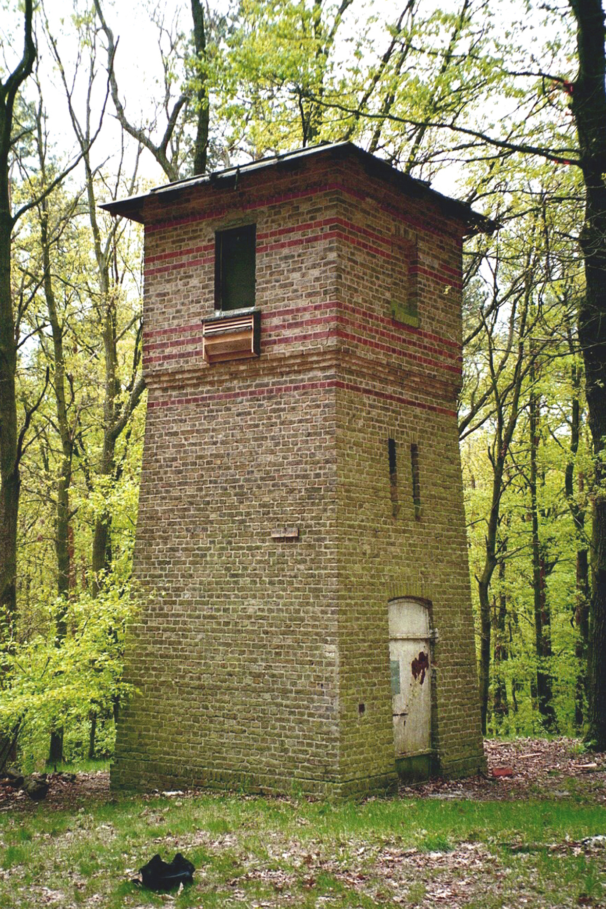 Mirenhaus im Königswald (NSG „Sacrower See und Königswald“), Potsdam, 2003